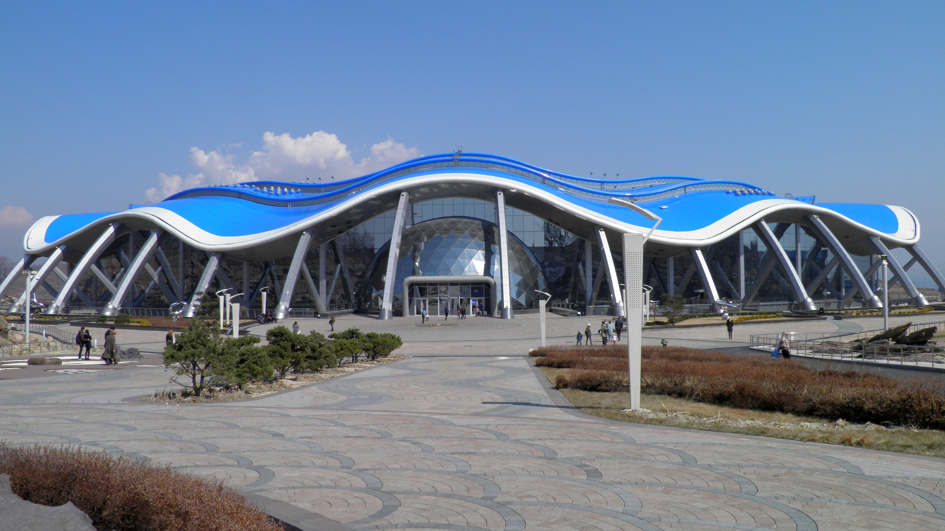 Главный корпус Приморского океанариума, главный вход